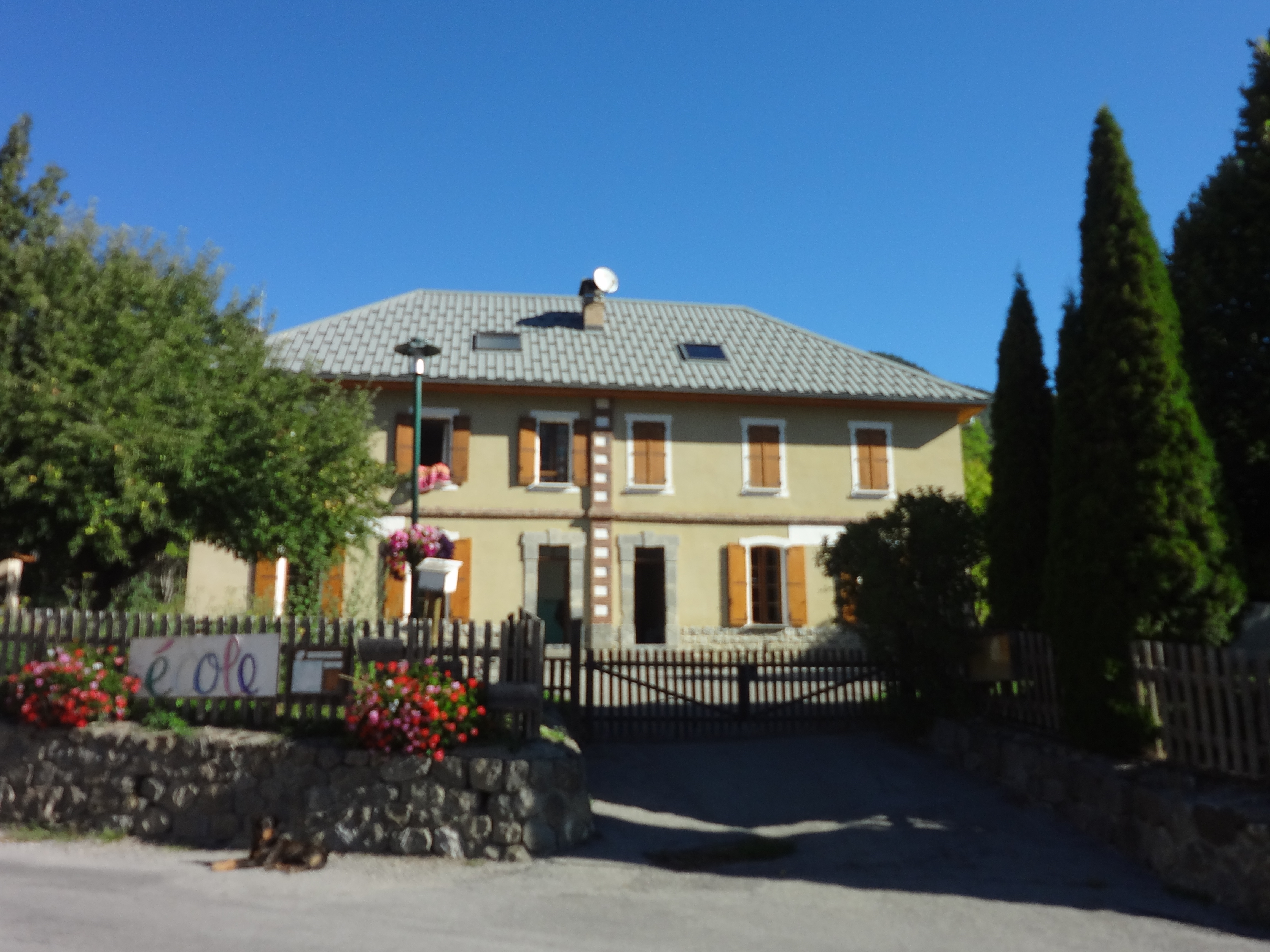 Ancienne cole du village de Rioclar-Haut, (environ 1250 m d'altitude). Commune de Méolans-Revel (Alpes-de-Haute-Provence)